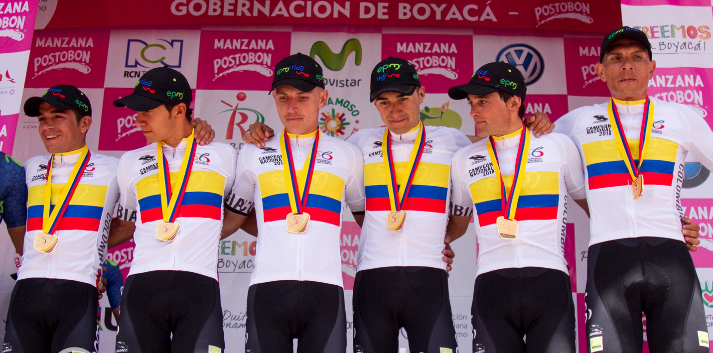 Contrarreloj por Equipos Campeonatos Nacionales de Ruta Boyacá 2016